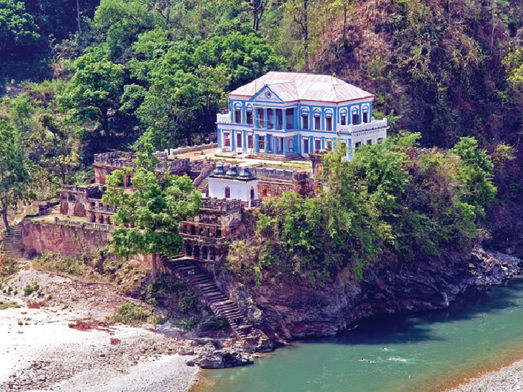 Rani Mahal am Flussufer des Kali Gandaki im Palpa-Distrikt